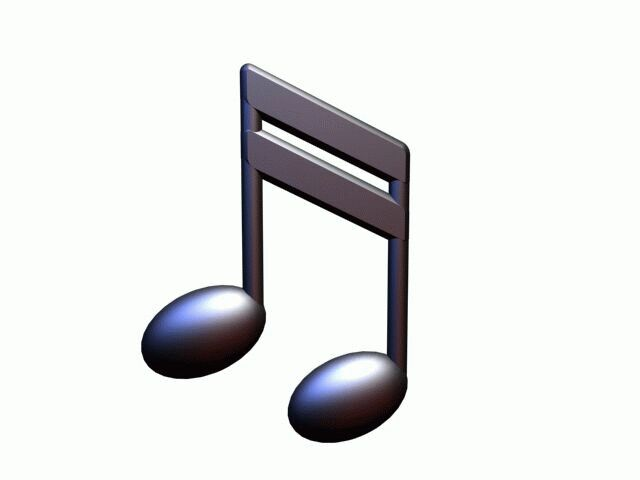 Võõrkeelse sõna hääldust saab kuulata, vajutades pildil olevale märgile.